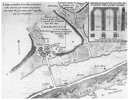 Plan de Maillé (Luynes), en Indre-et-Loire